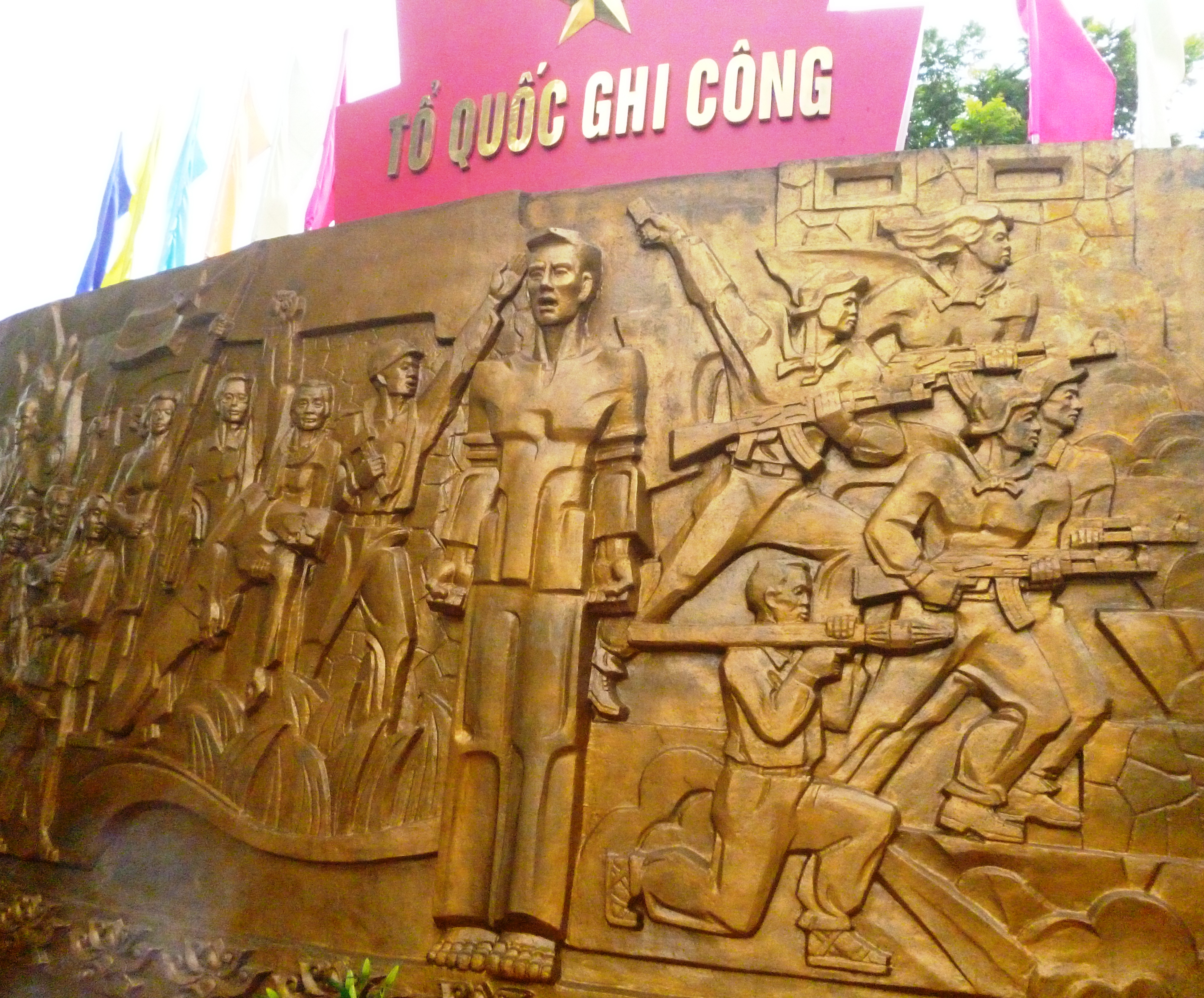 Hình chụp bằng máy ảnh cá nhân về tượng đài Nguyễn Văn Trỗi tại Quận 3